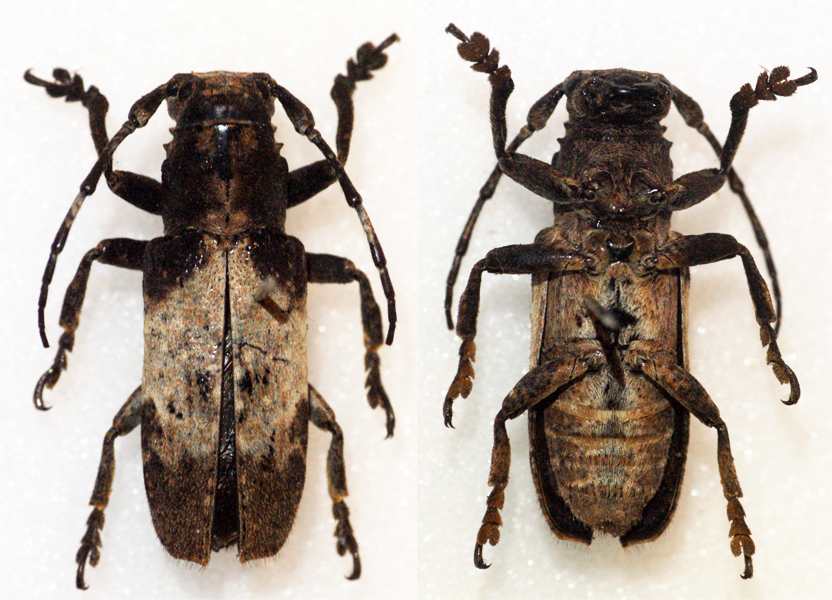 Newman,1842 Sex: ? Data: 04-2013 - Dupax del sur - Visayas - Philippines Size: ?